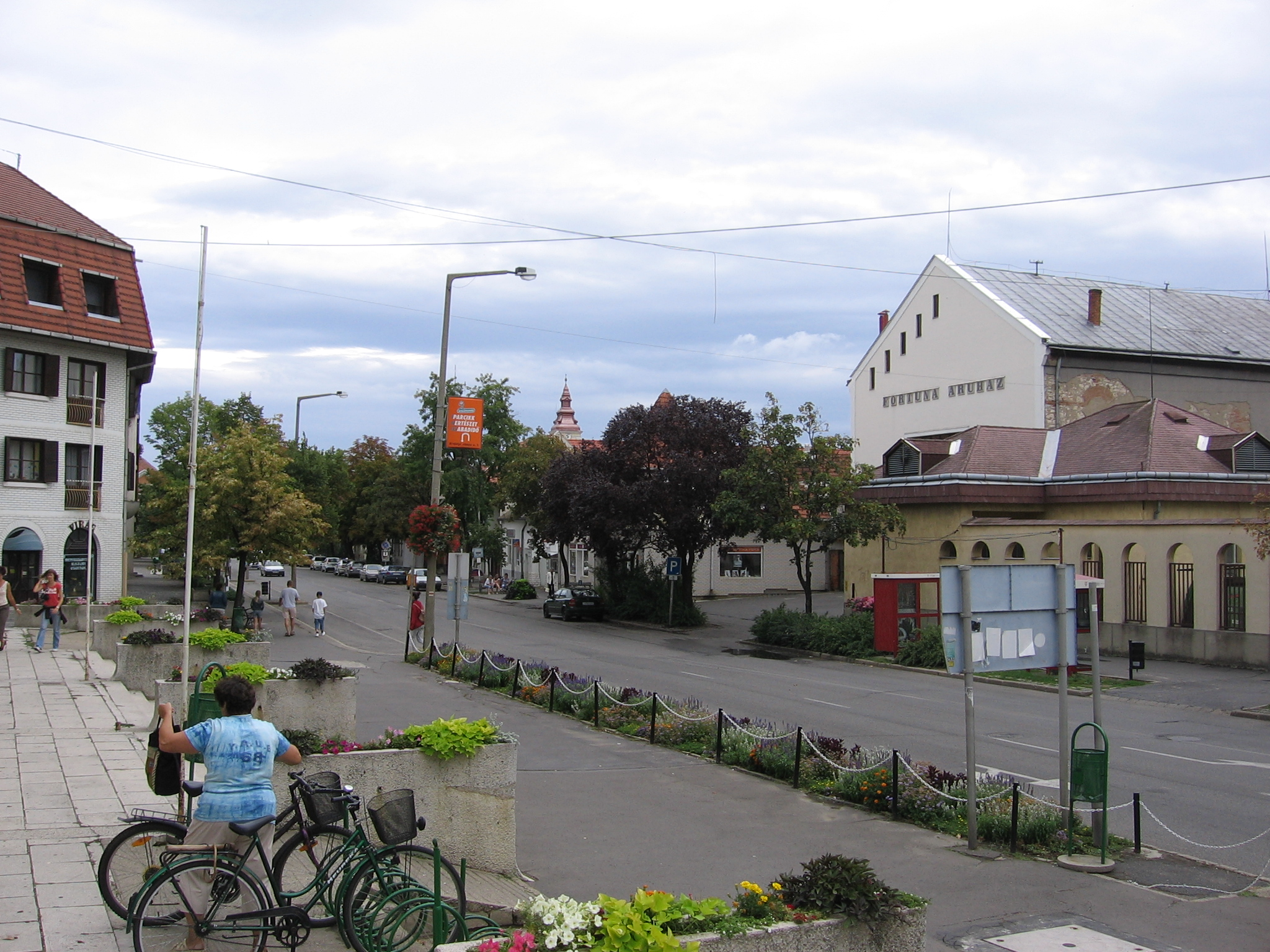 Sárospatak main street Główna ulica w Sárospatak